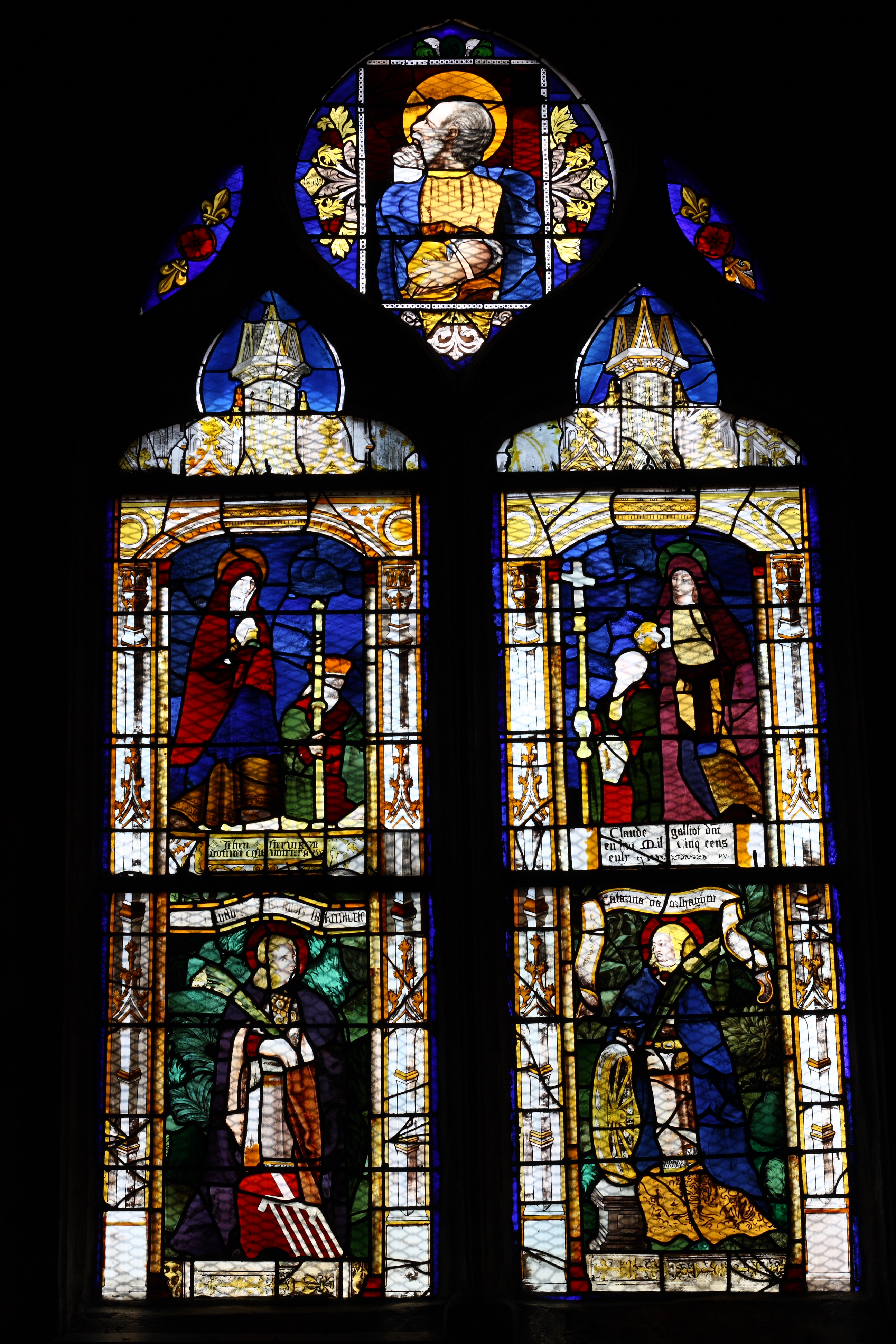 Bleiglasfenster in der katholischen Pfarrkirche Saint-Jean-Baptiste in Sceaux im Département Hauts-de-Seine in der Île-de-France, Darstellung: Heilige (siehe Laurence de Finance: Un patrimoine de lumière 1830−2000. Verrières des Hauts-de-Seine, Seine-Saint-Denis, Val-de-Marne. Éditions du patrimoine (Centre des monuments nationaux), Paris 2003, 2-85822-781-0